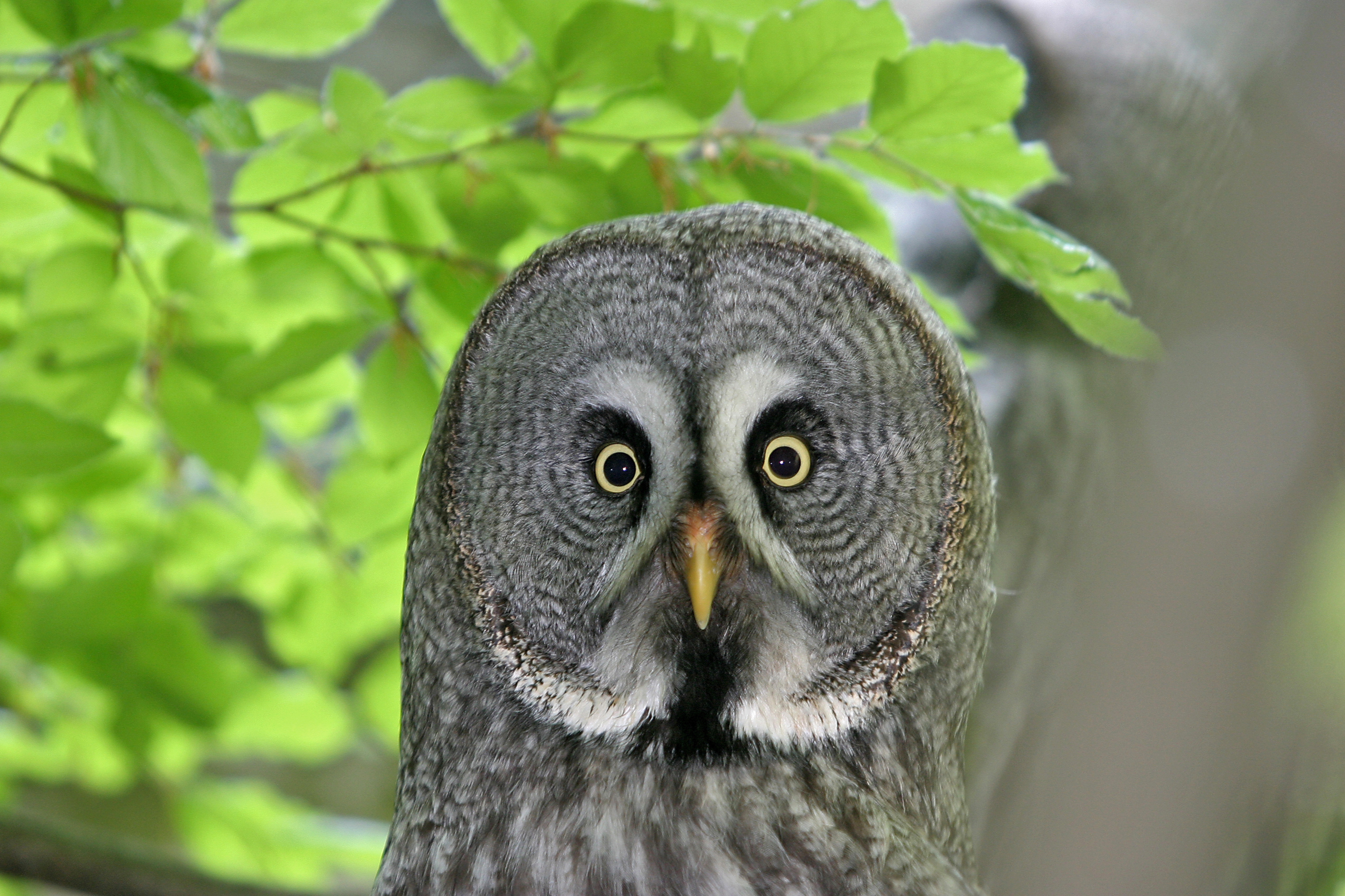 Chouette lapone